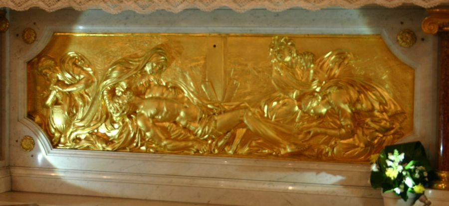 Devant d'autel (antependium) : Déposition de croix - François Anguier - Saint Pierre Saint Paul de Rueil